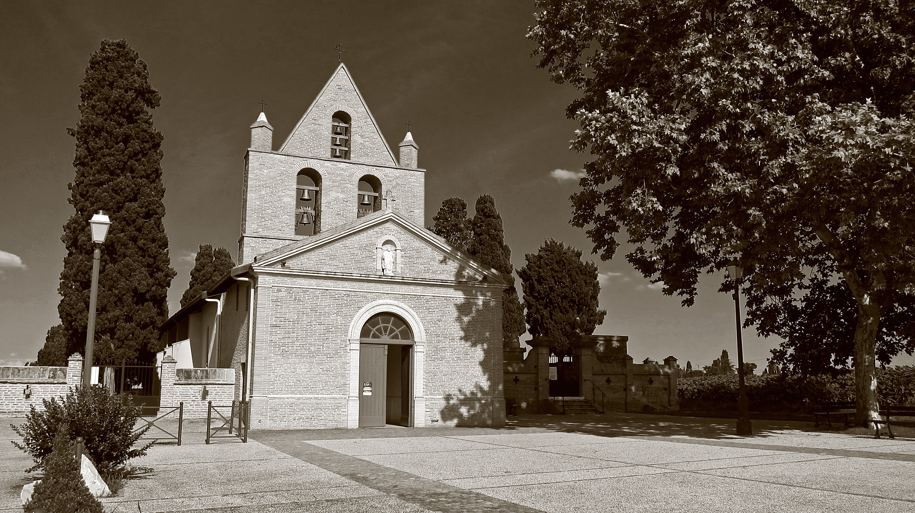 Mondouzil (Haute-Garonne, Midi-Pyrénées, France) : L'église Saint-Martial.